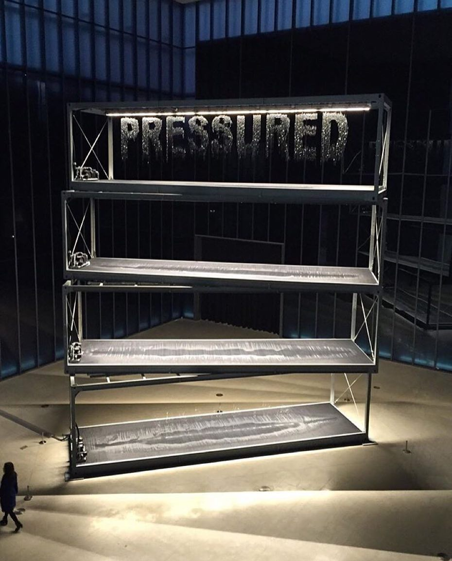 via Instagram ift.tt/1IeW4Ff